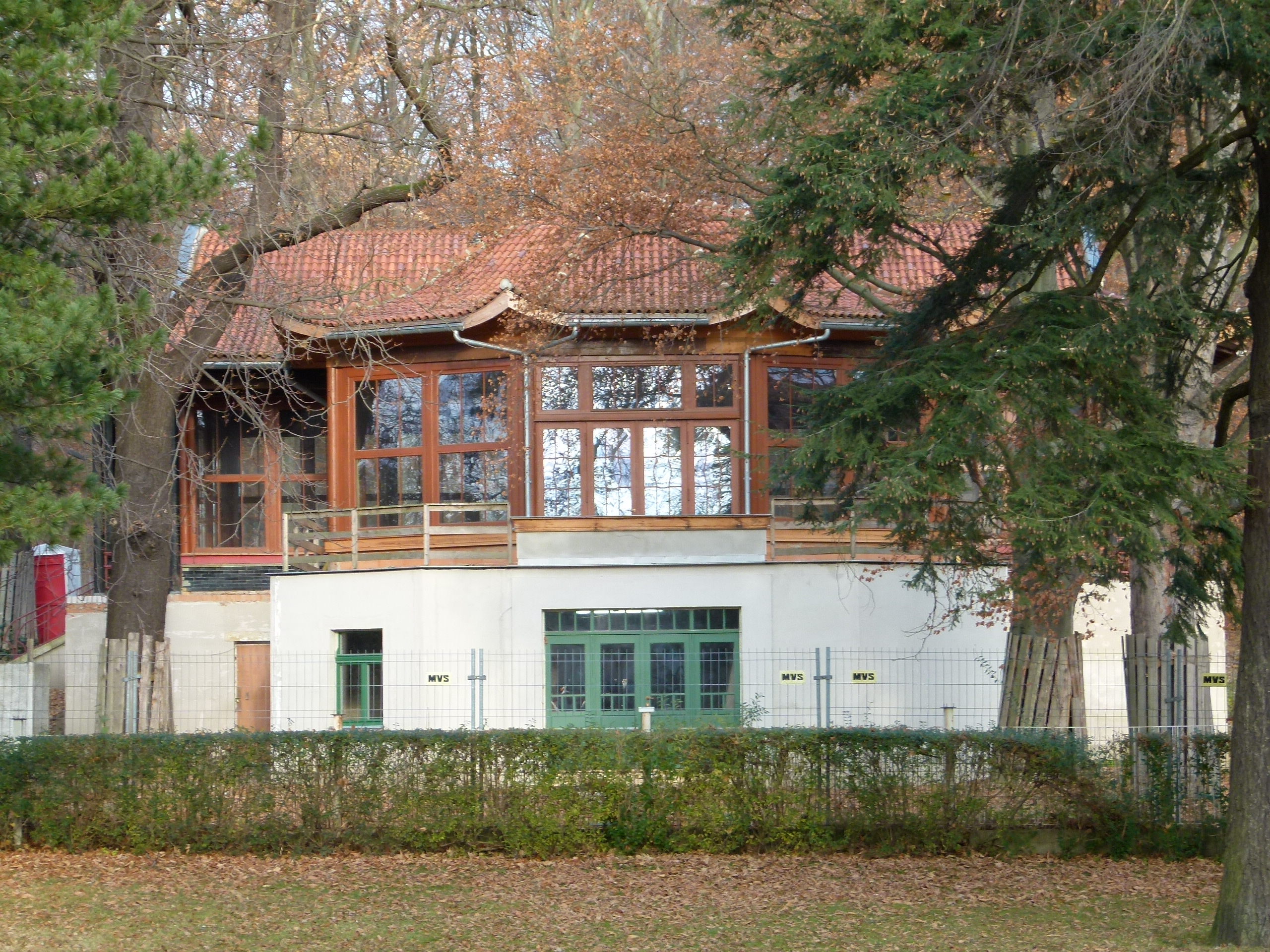 China-Pavillon, Bautzner Landstraße 17a, Weißer Hirsch, Dresden